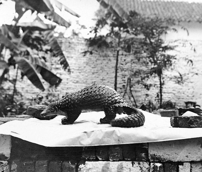 Repronegatief. Een lopende miereneter in Kediri, Java